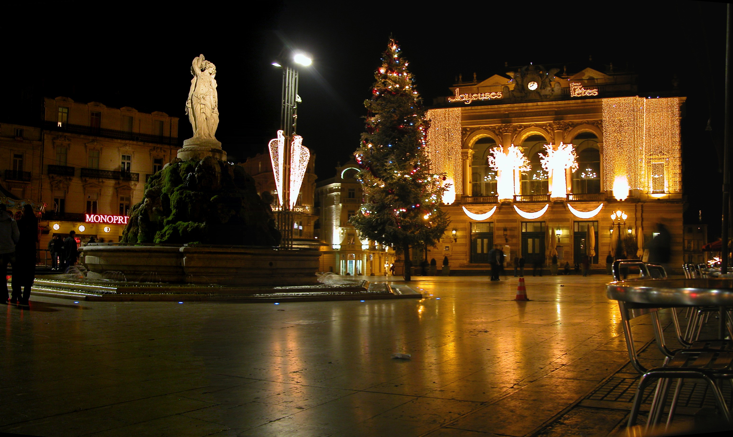 La place de la Comédie (Montpellier, Hérault) illuminée à Noël - Photo personnelle.